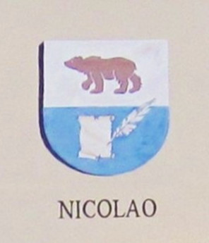 Cognomi storici dei Vicini che discendono dalle famiglie della Regola che abitavano a Predazzo e riguardano 19 cognomi: Boninsegna, Bonora, Bosin, Brigadoi, Defrancesco, Degaudenz, Dellagiacoma, Dellantonio, Dellasega, Demartin, Dezulian, Felicetti, Gabrielli, Giacomelli, Guadagnini, Morandini, Nicolao, Piazzi e Zanna.